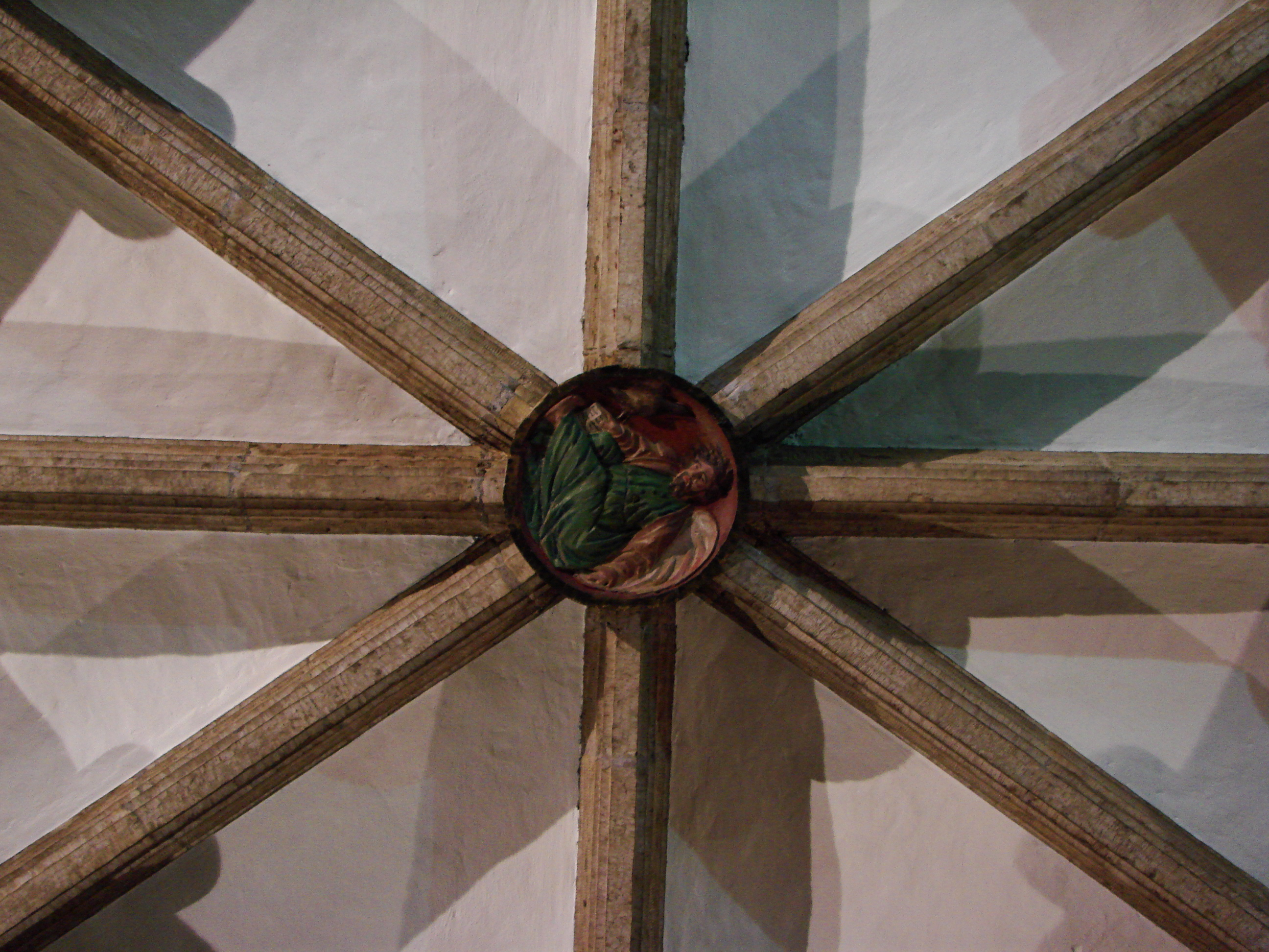 San Sebastián, province de Gipuzkoa (Espagne) : Clef de voute en l'église Saint Vincent